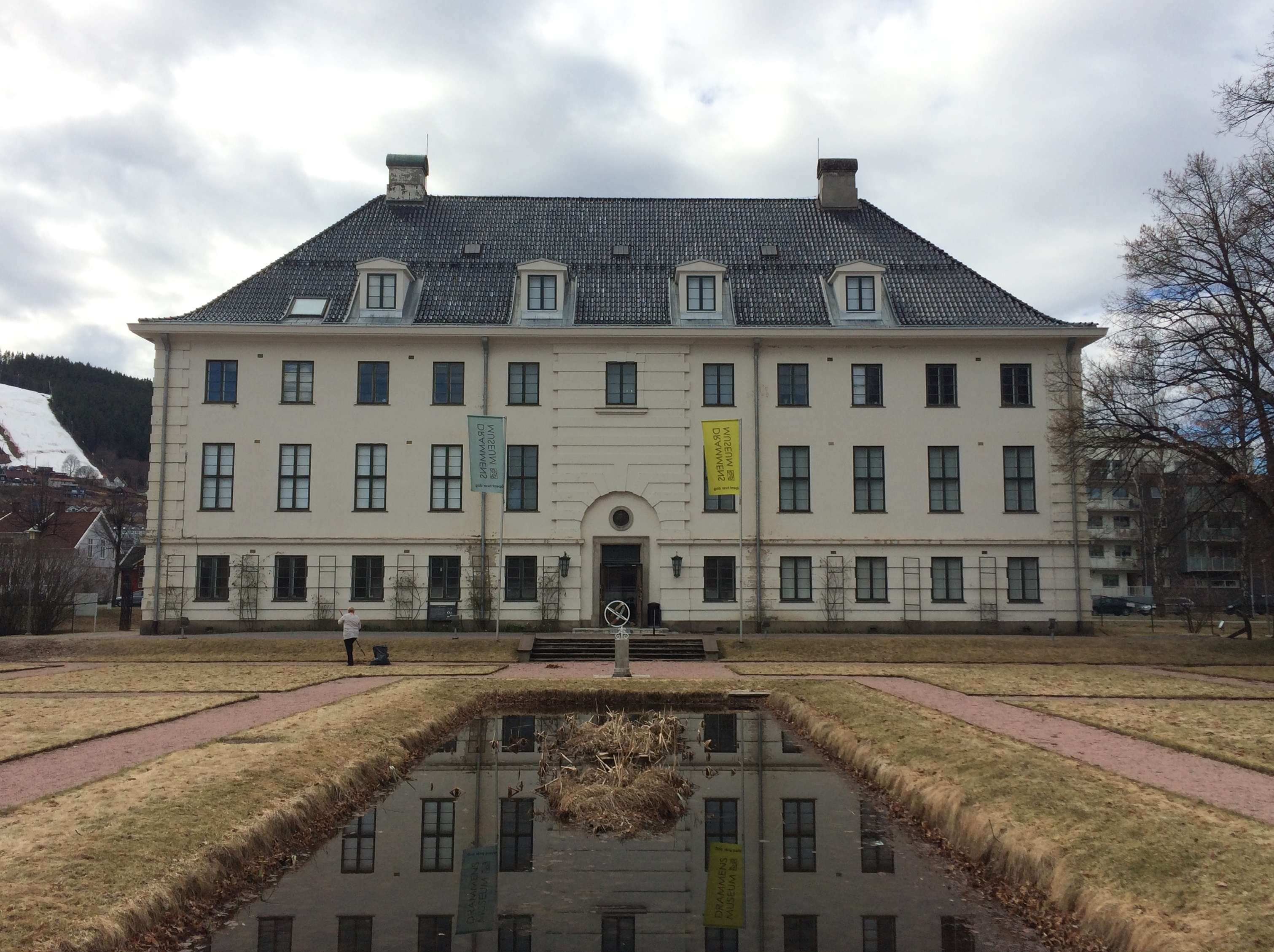 Drammens museum sett fra inne på museumsområdet